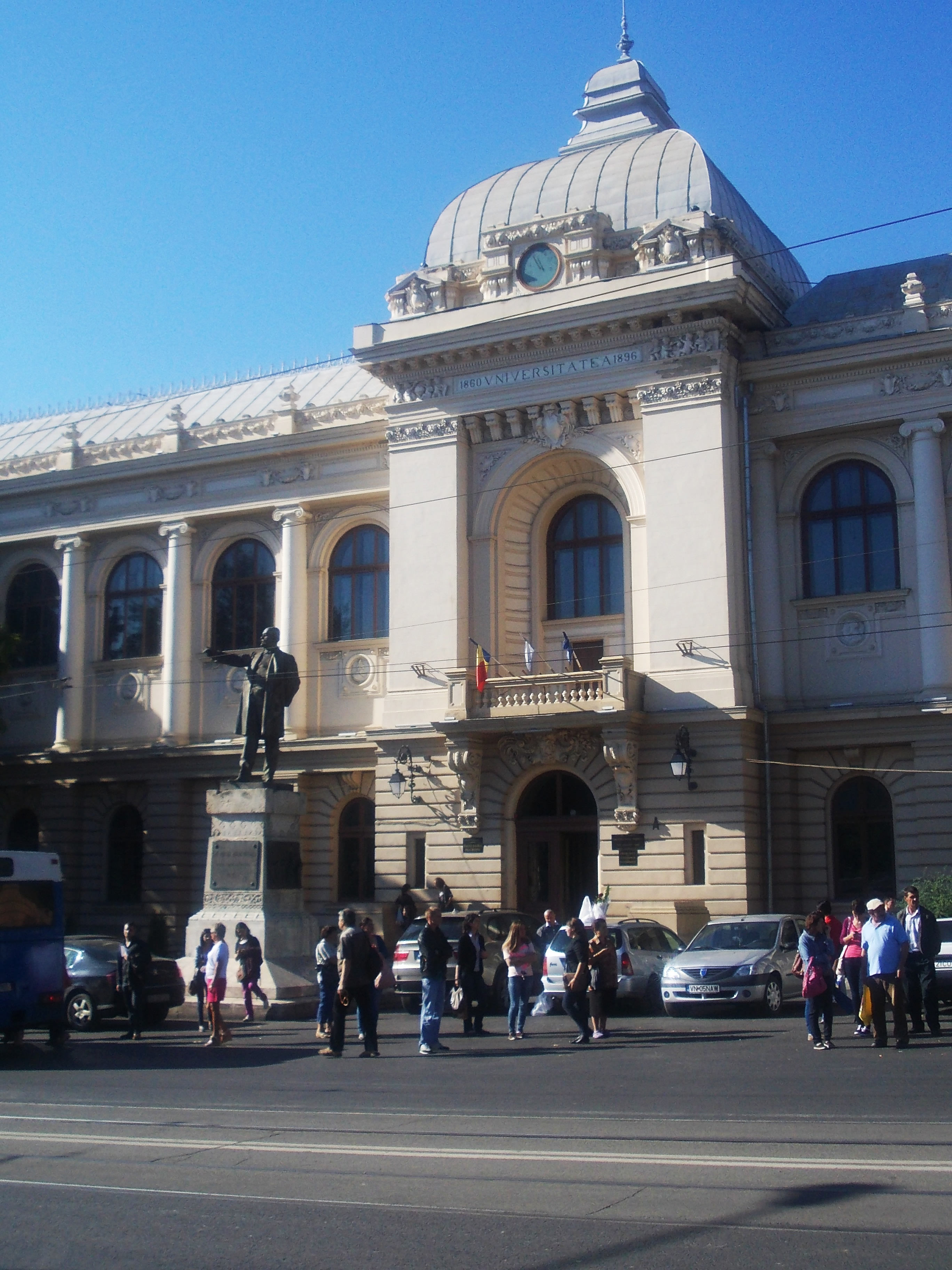 municipiul Iași, bd. Carol 11